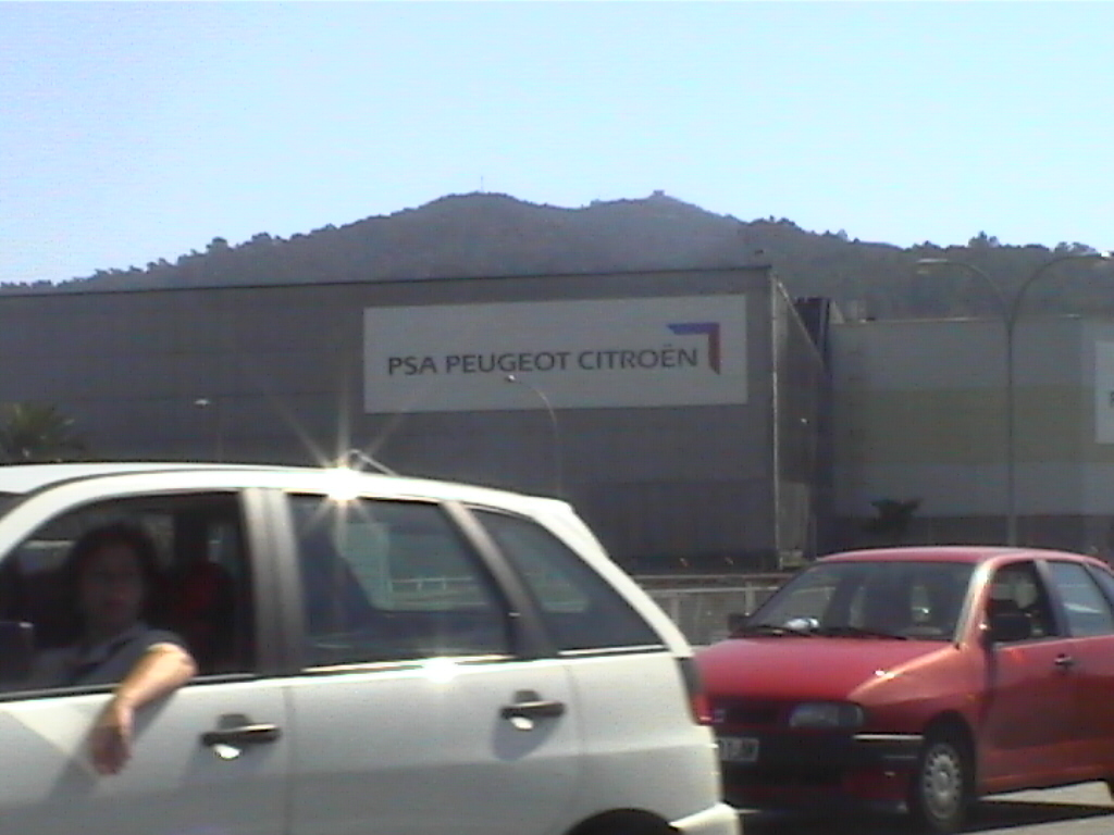 PSA Peugeot Citroen